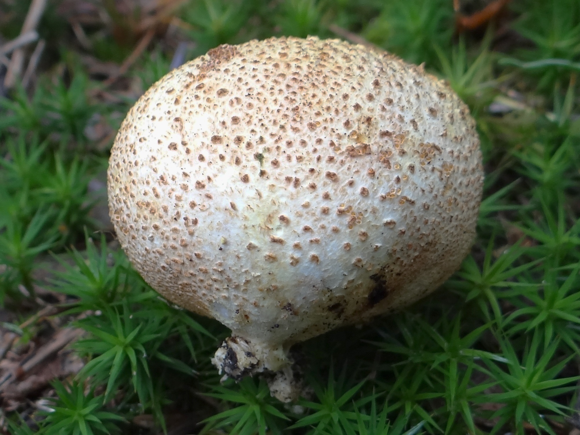 Scleroderma areolatum